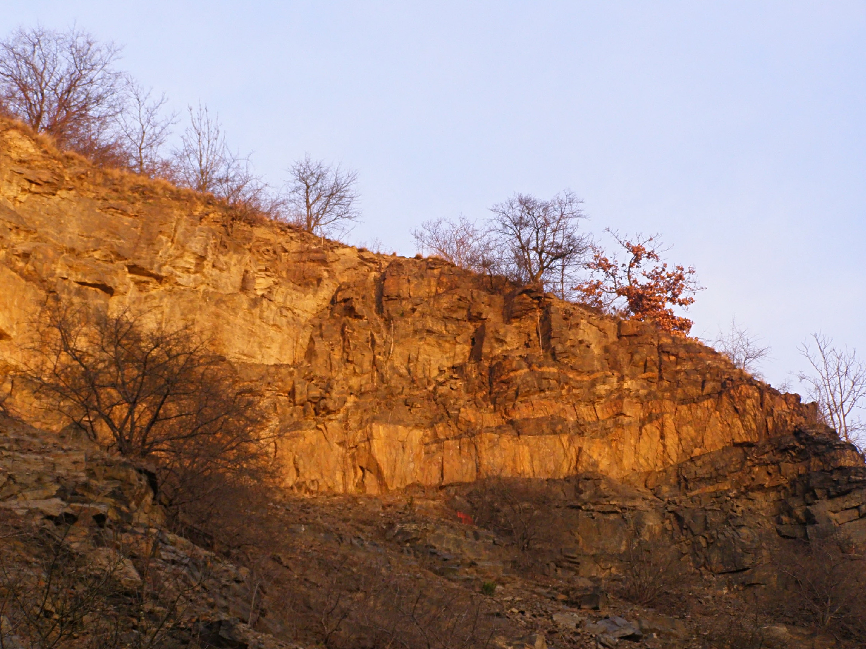 PR Roztocký háj - Tiché údolí, lom